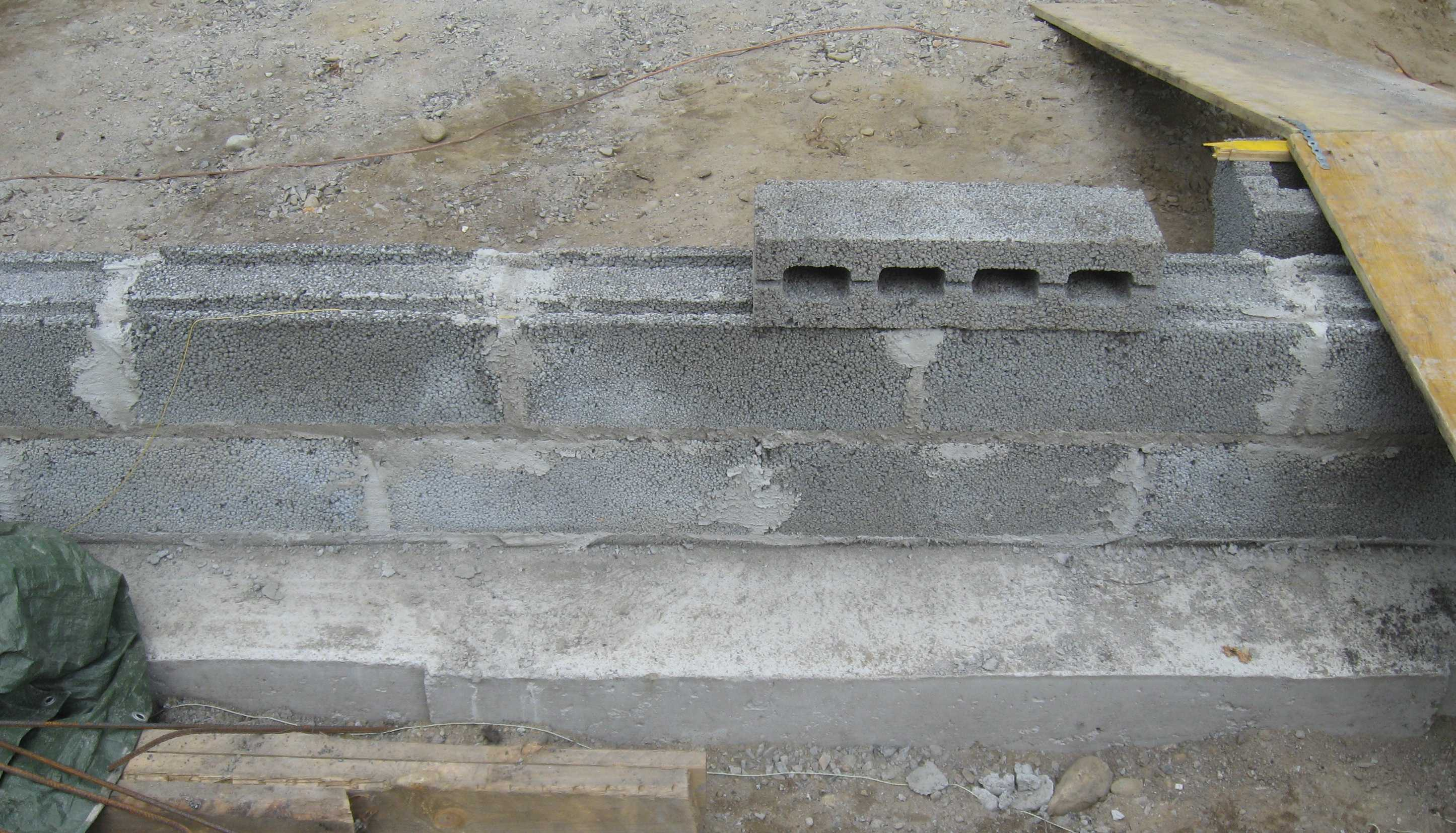 Sokkeli ylempänä, alempana anturaa